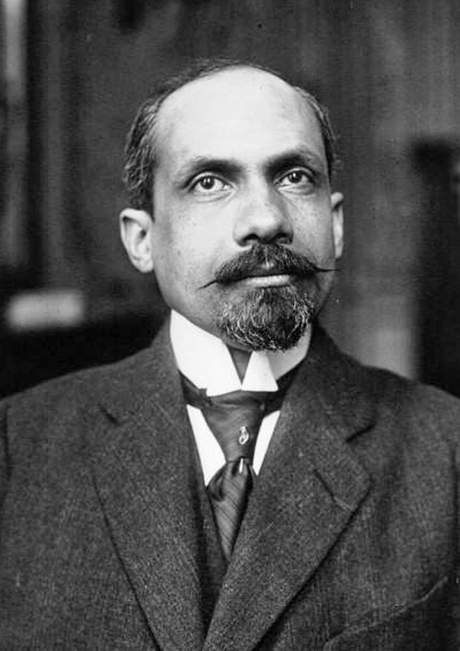 M. Lemery, sous-secrétaire au Commerce [photographie de presse]